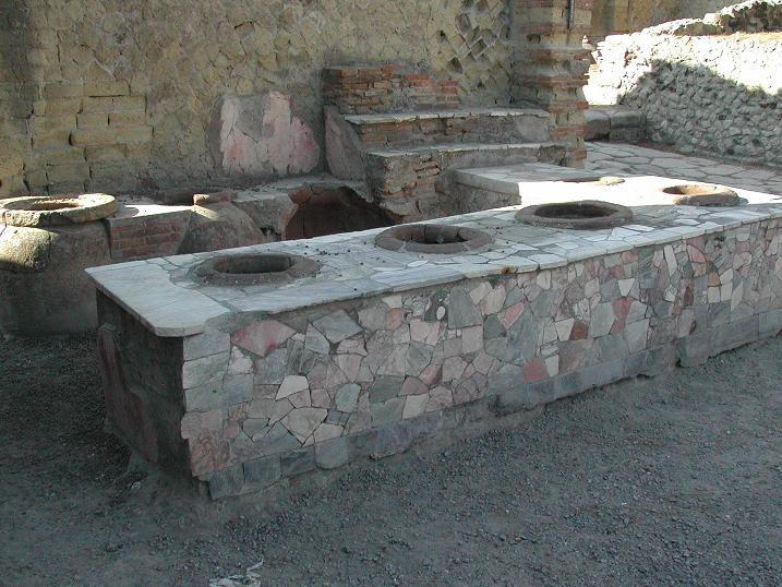 Grande taberna foto di Aldo Ardetti (14 agosto 2007)